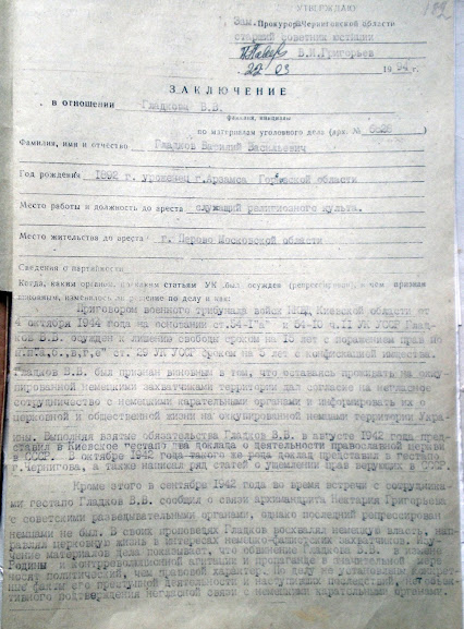 Заключение о реабилитации Гладкова Василия Васильевича (стр. 1)